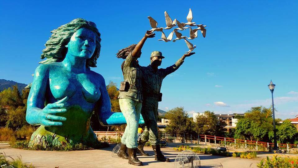 Monumento De la Reconcilacion, En San Salavdor. para conmemorar los Acuerdos De Paz